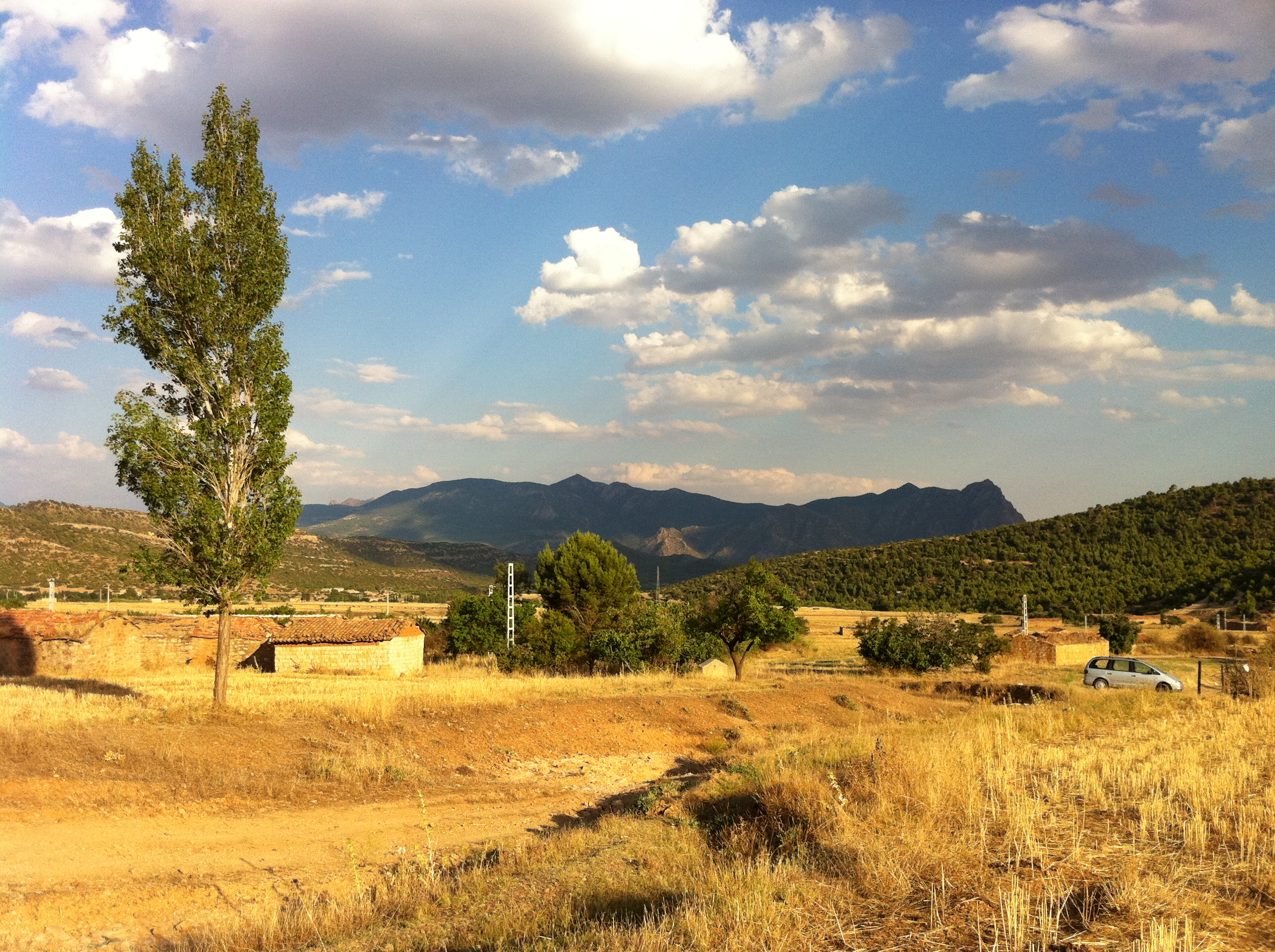 Village abandonné depuis environ 20 ans.